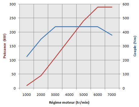 Graphe Puissance-Couple en fonction du régime moteur de l'Audi RS4 B5